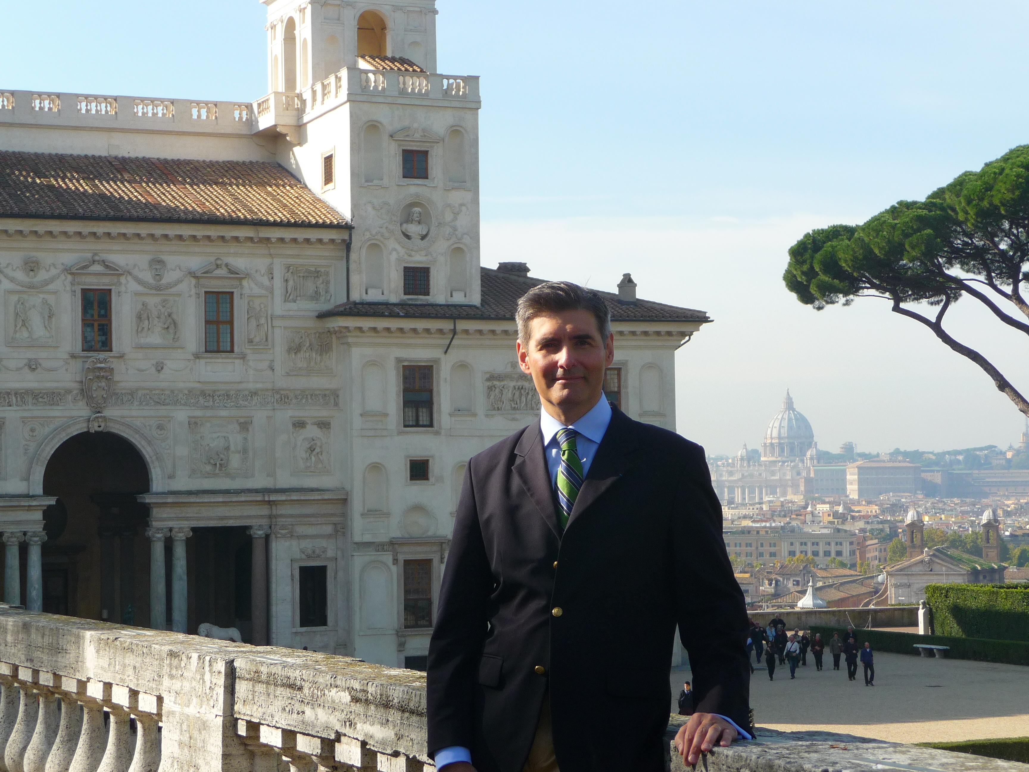 Jean-François Delmas, conservateur général, sur la terrasse de la Villa Médicis. La basilique Saint-Pierre de Rome dans le fond. Novembre 2012.